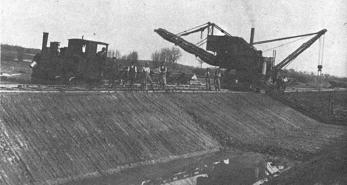 Die Bünz wird begradigt und in einen Kanal gelegt.